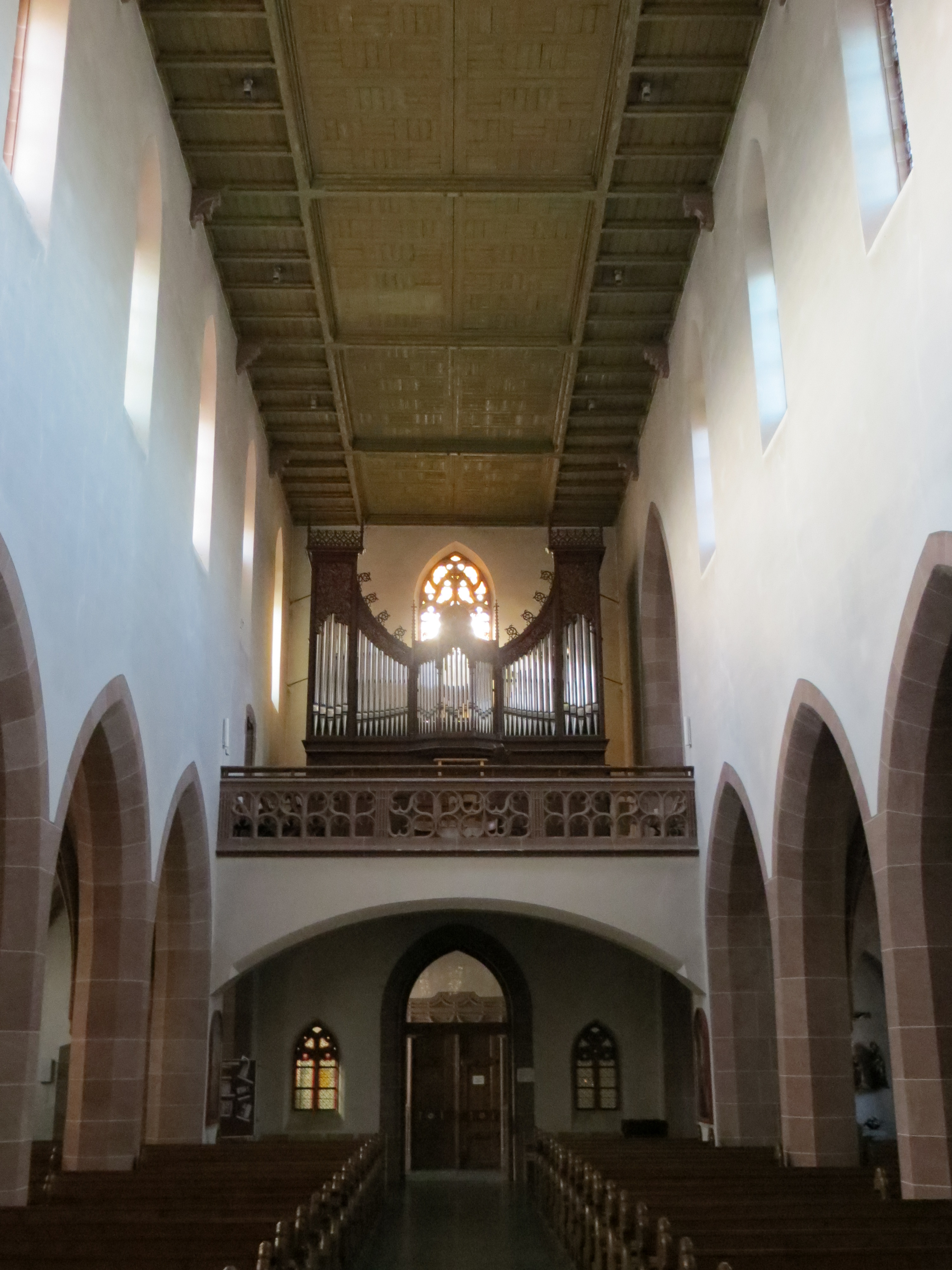 Pfarrkirche St. Martin Großweier Schwarz-Orgel